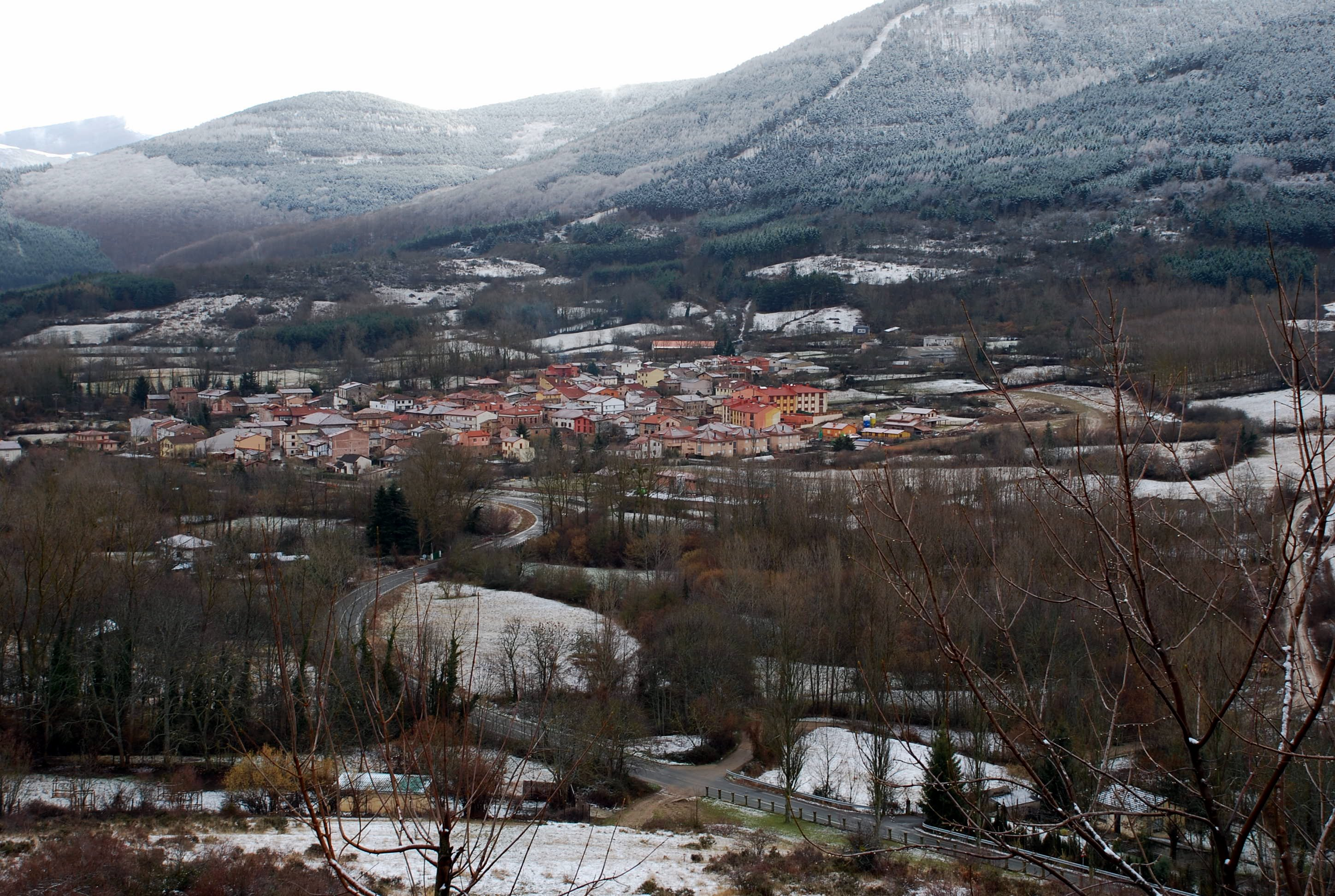 Valgañón nevado